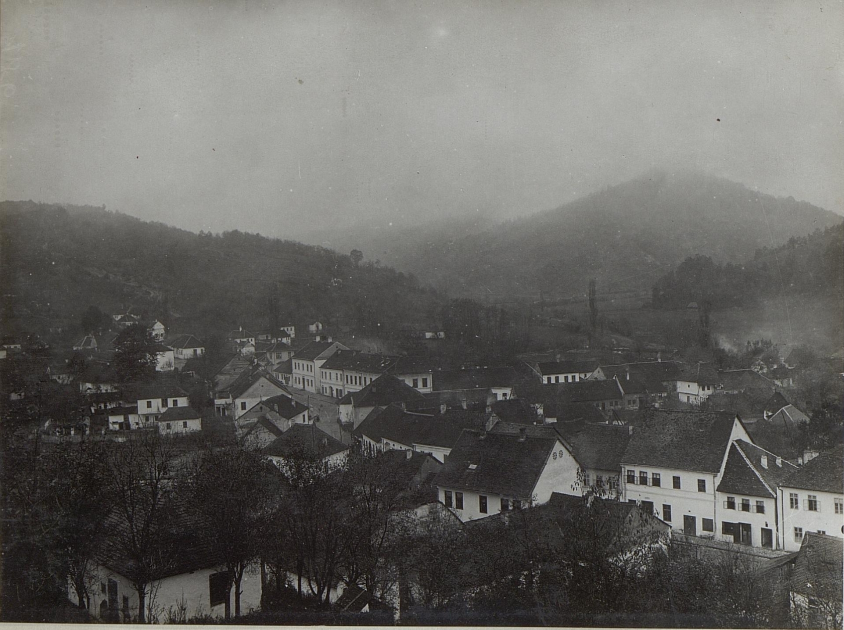 Kruppanj.